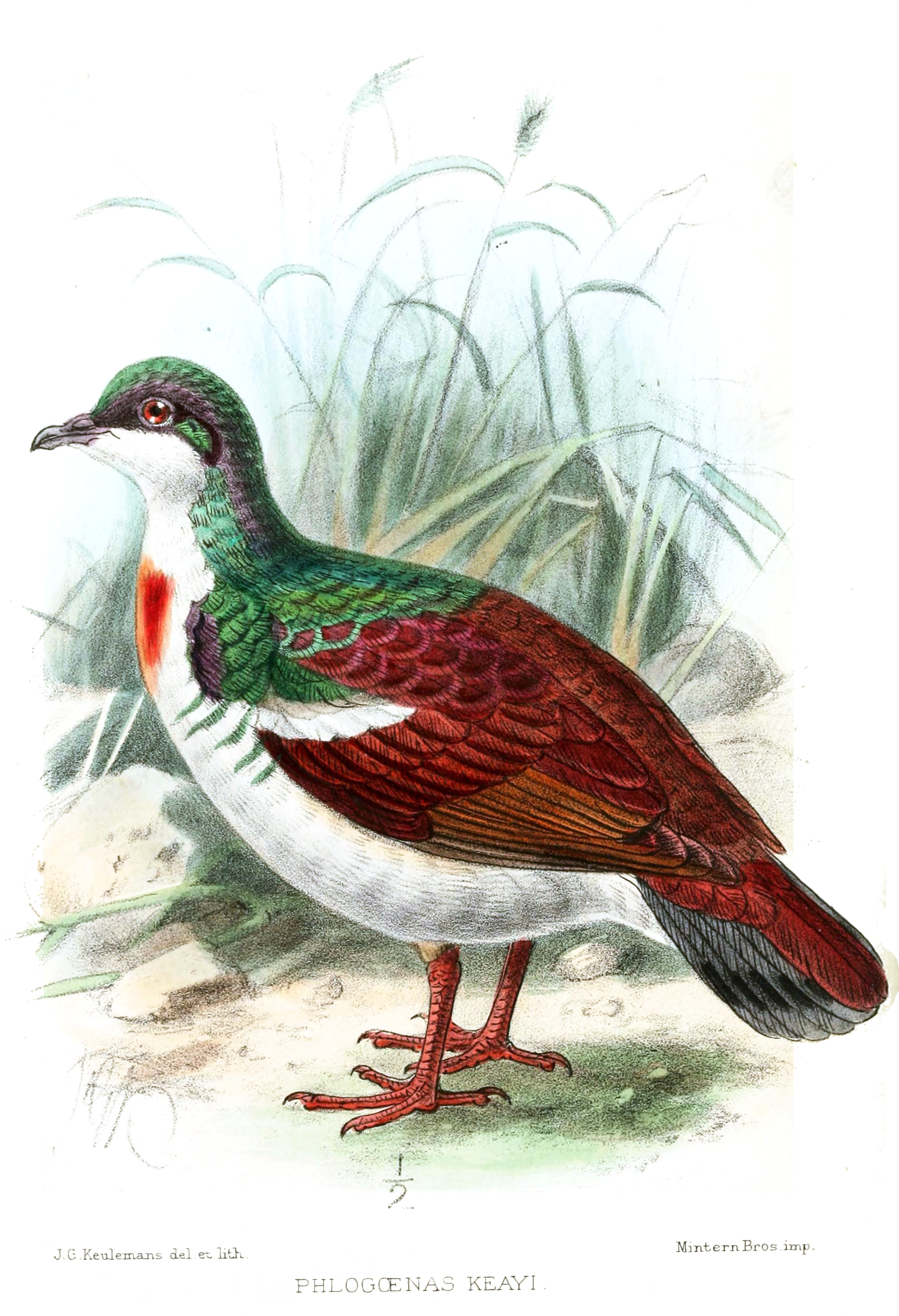 Phlegoenas keayi = Gallicolumba keayi